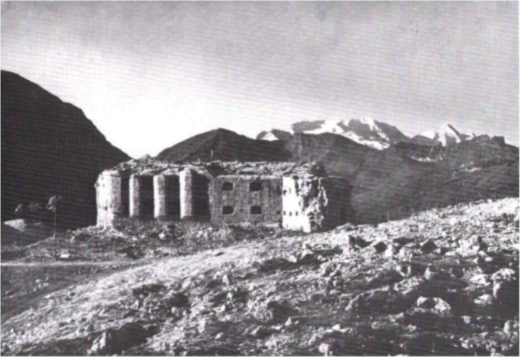 Fort Tre Sassi (Werk Tre Sassi)